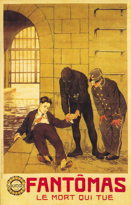 Le Mort qui tue (1913), affiche du troisième film adapté de la saga Fantômas par Louis Feuillade d'après le roman éponyme de Pierre Souvestre & Marcel Allain.